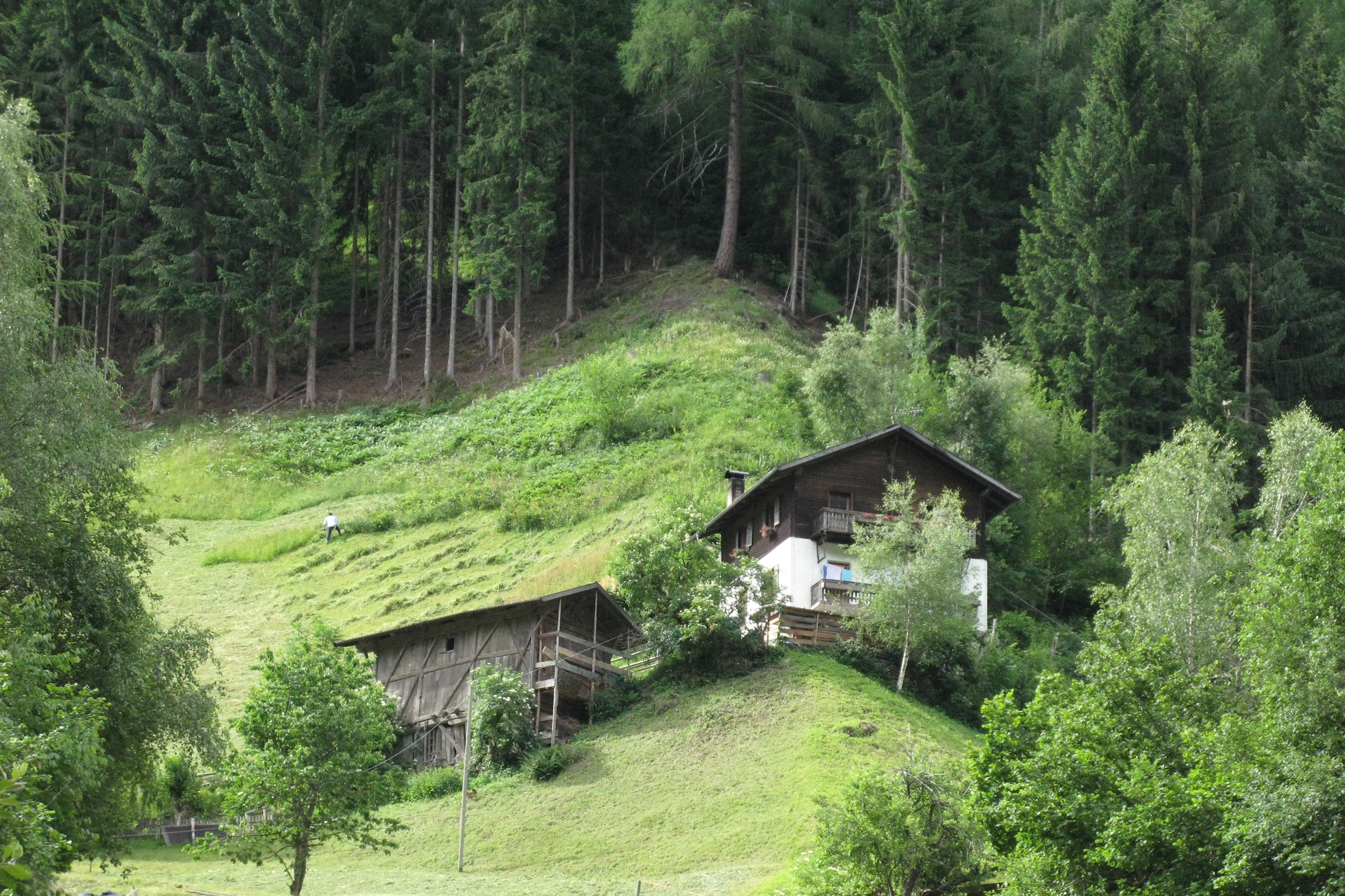 Haitegt Gebai vum Lotterbad.